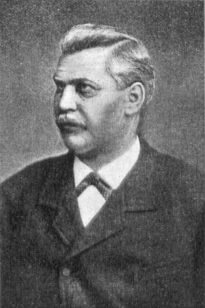 Der Konstrukteur mechanischer Musikautomaten Paul Friedrich Ernst Ehrlich